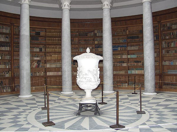 library